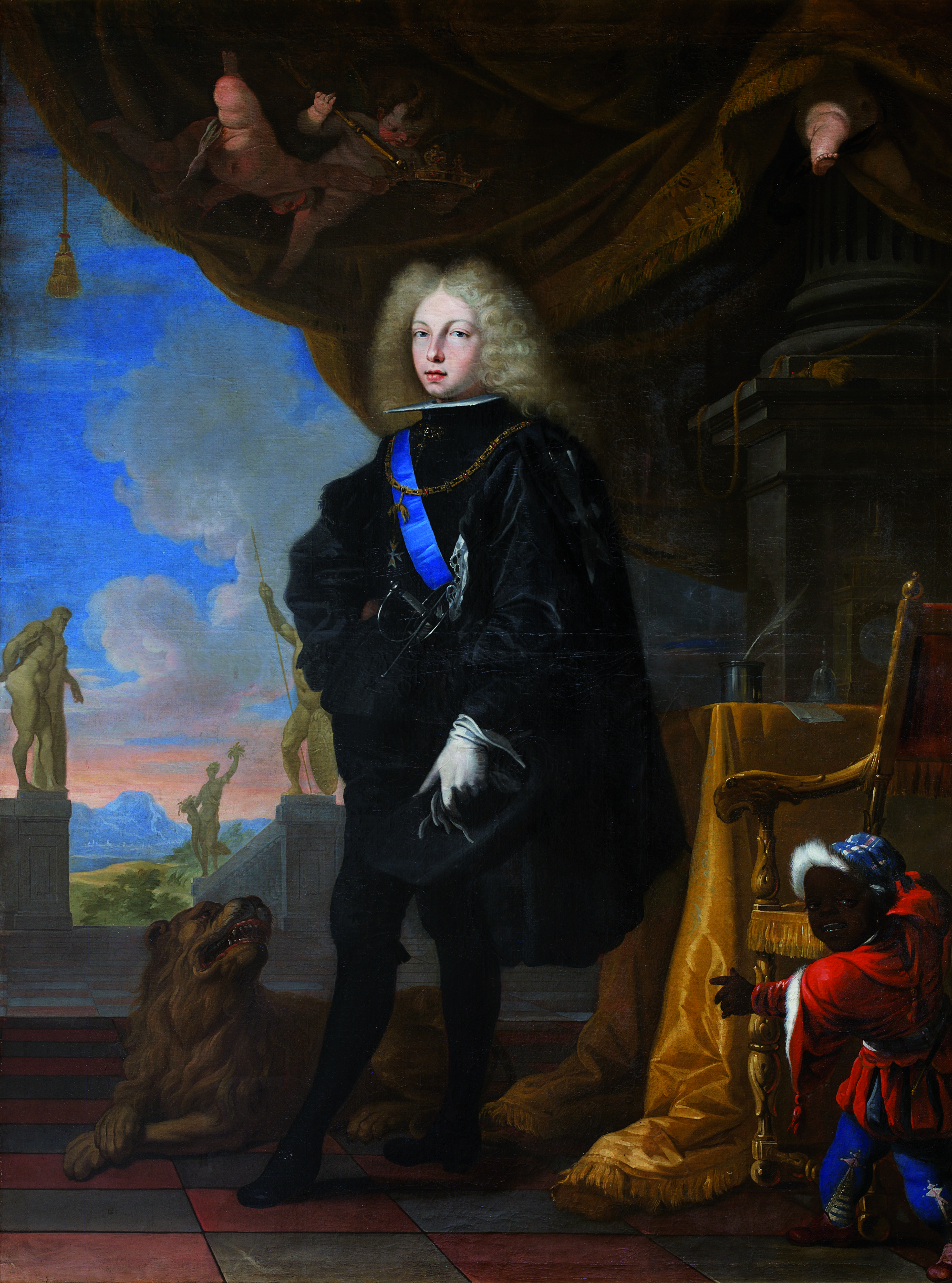 Retrato del rey Felipe V de España (1683-1746), que fue nieto del rey Luis XIV de Francia y el primer monarca de la Casa de Borbón en España.